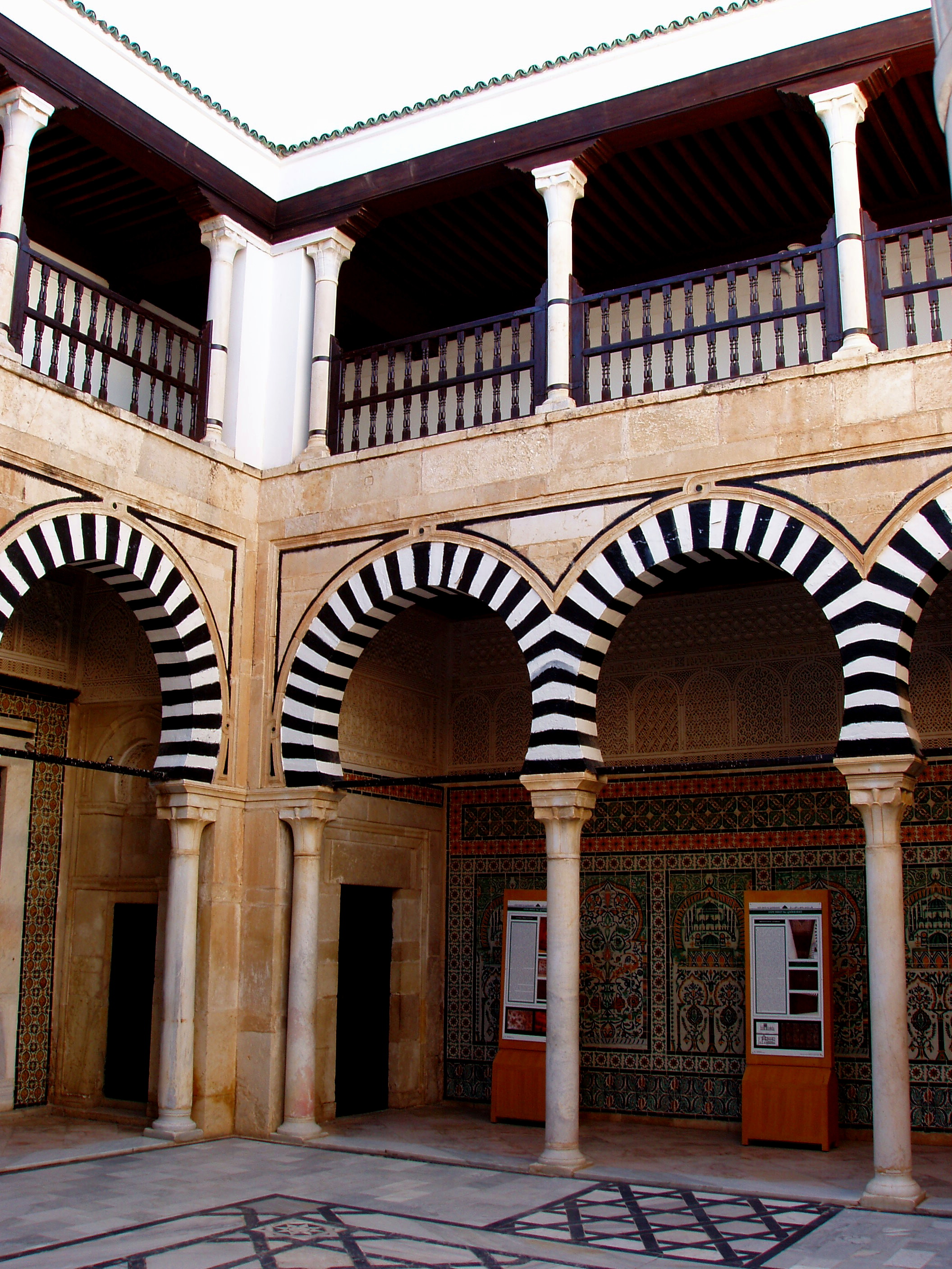 Zaouia Sidi Abid el Ghariani courtyard in Kairouan (Tunisia)